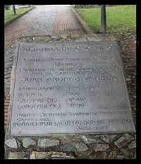 la placa de la foto muestra datos de interes del pueblo Altamira de Cáceres, fundador, Altitud y latitud entre otros